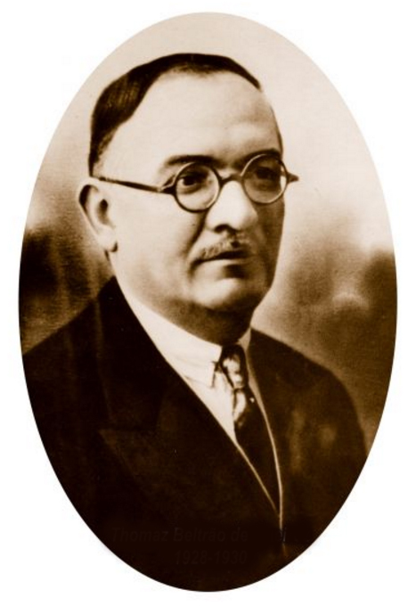 Thomaz Beltrão de Queiroz